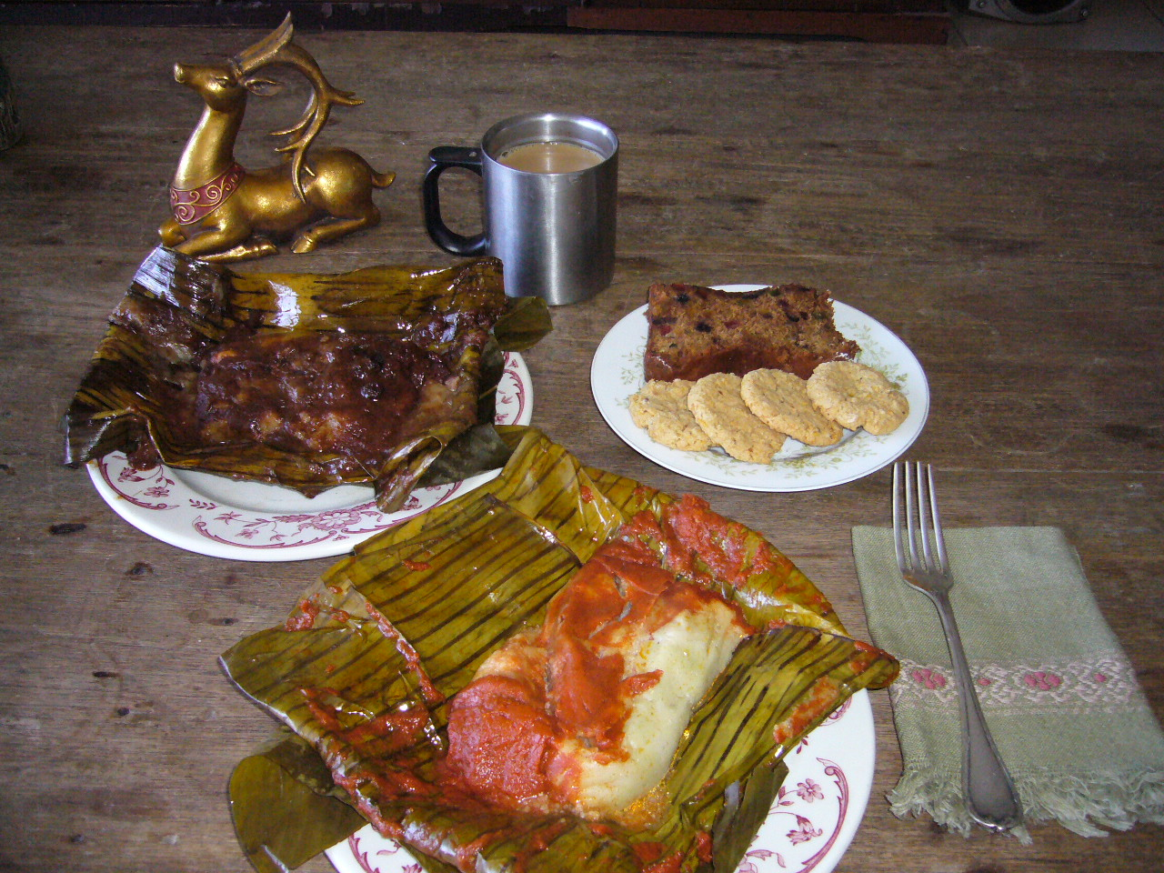 Tamales negro y colorado de Guatemala, acompañados por café, galletas de avena y pastel de frutas, desayuno típico de Navidad